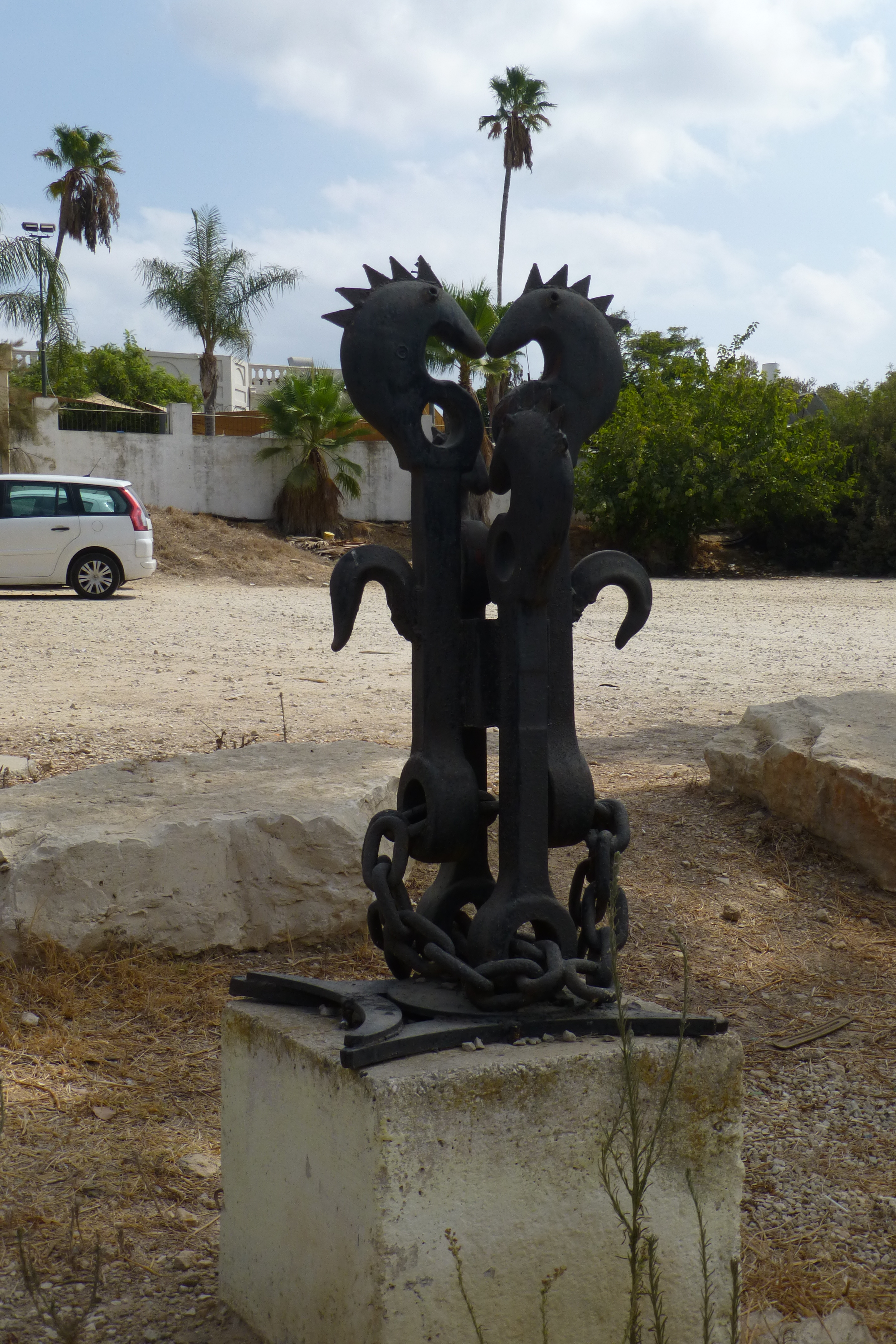 ביתו של דוד לוינסון. על פי צוואתו שבעל פה שימש ביתו החל ב-1952 כ"בית מרגוע לסופר ולמורה". בהמשך הפך לבית מרגוע לכל, לפנימיה לחינוך הדתי וכיום משמש כפנימיה לחינוך מיוחד.